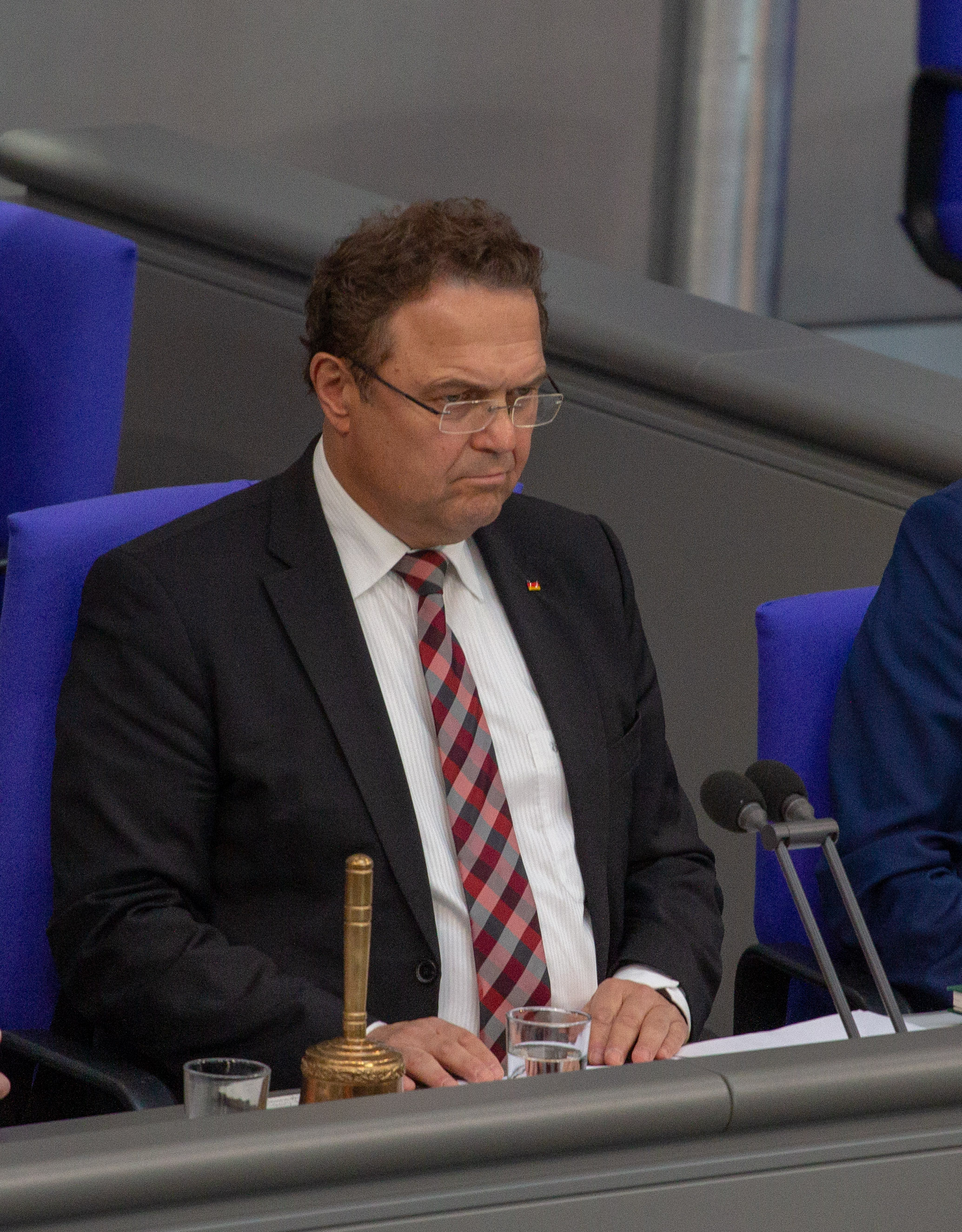 Hans-Peter Friedrich, Mitglied des Deutschen Bundestages, während einer Plenarsitzung am 10. April 2019 in Berlin.